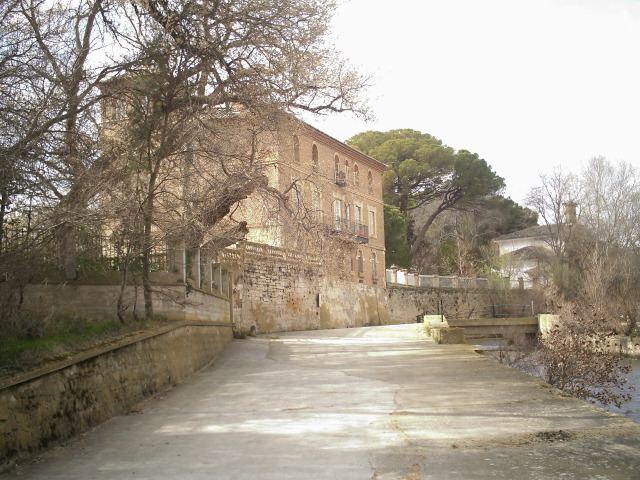 El Bocal de Fontellas - Navarra (Spain) Palacio de Carlos V y Ribera del río Ebro